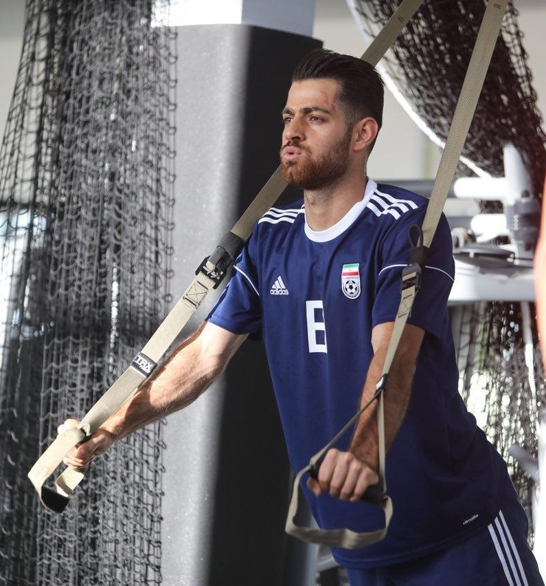 مرتضی پورعلی‌گنجی در تمرین آماده‌سازی تیم ملی فوتبال ایران در سال ۲۰۱۸